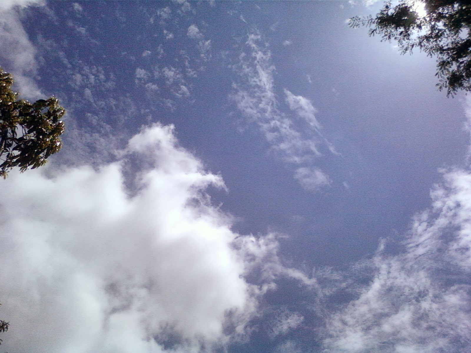 ആകാശം